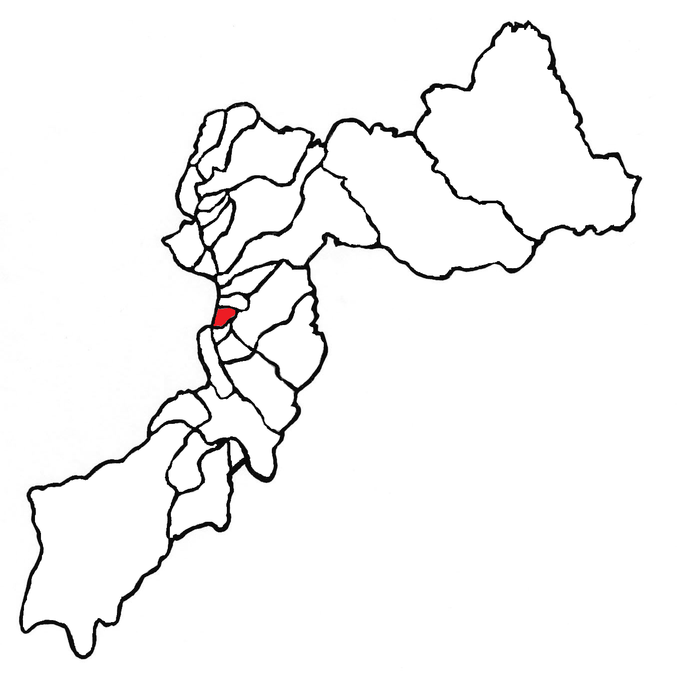 Ubicación del distrito en la provincia de Huancayo, departamento de Junín, Perú